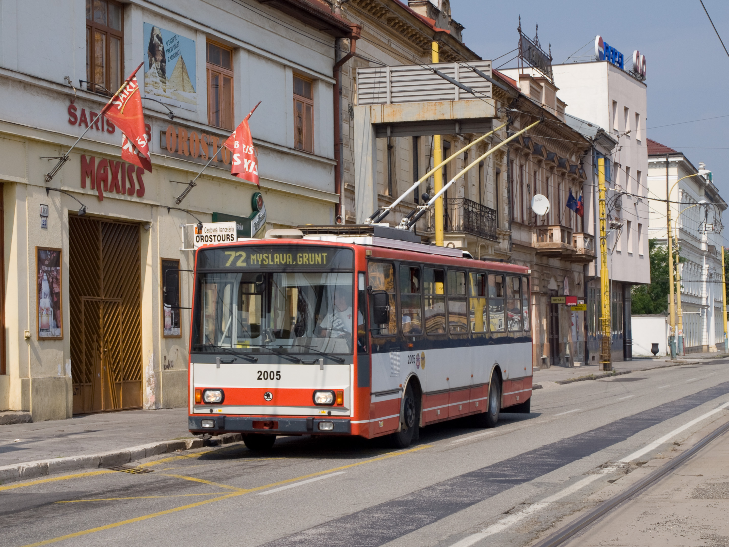 Škoda 14 Tr, Námestie osvoboditeľov, Košice